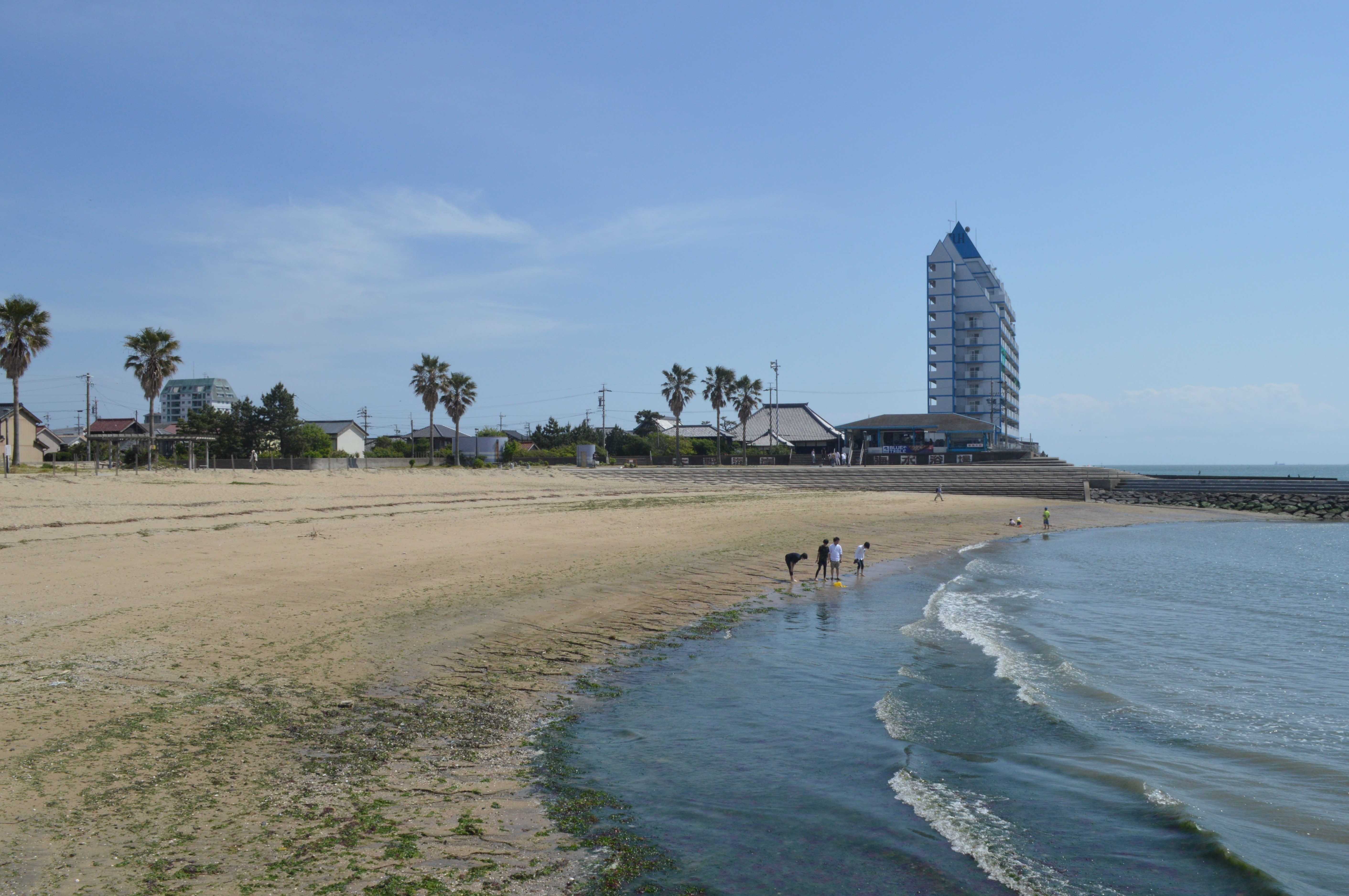 愛知県常滑市にある大野海水浴場（大野海岸）。